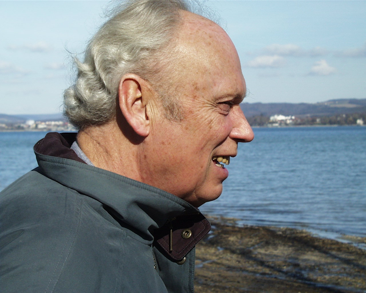 Robert-Walser-Forscher Jochen Greven am Bodensee